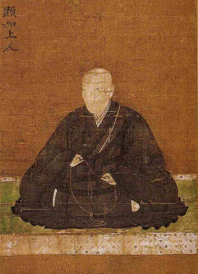 Image:Kennyo.jpgの拡大画像